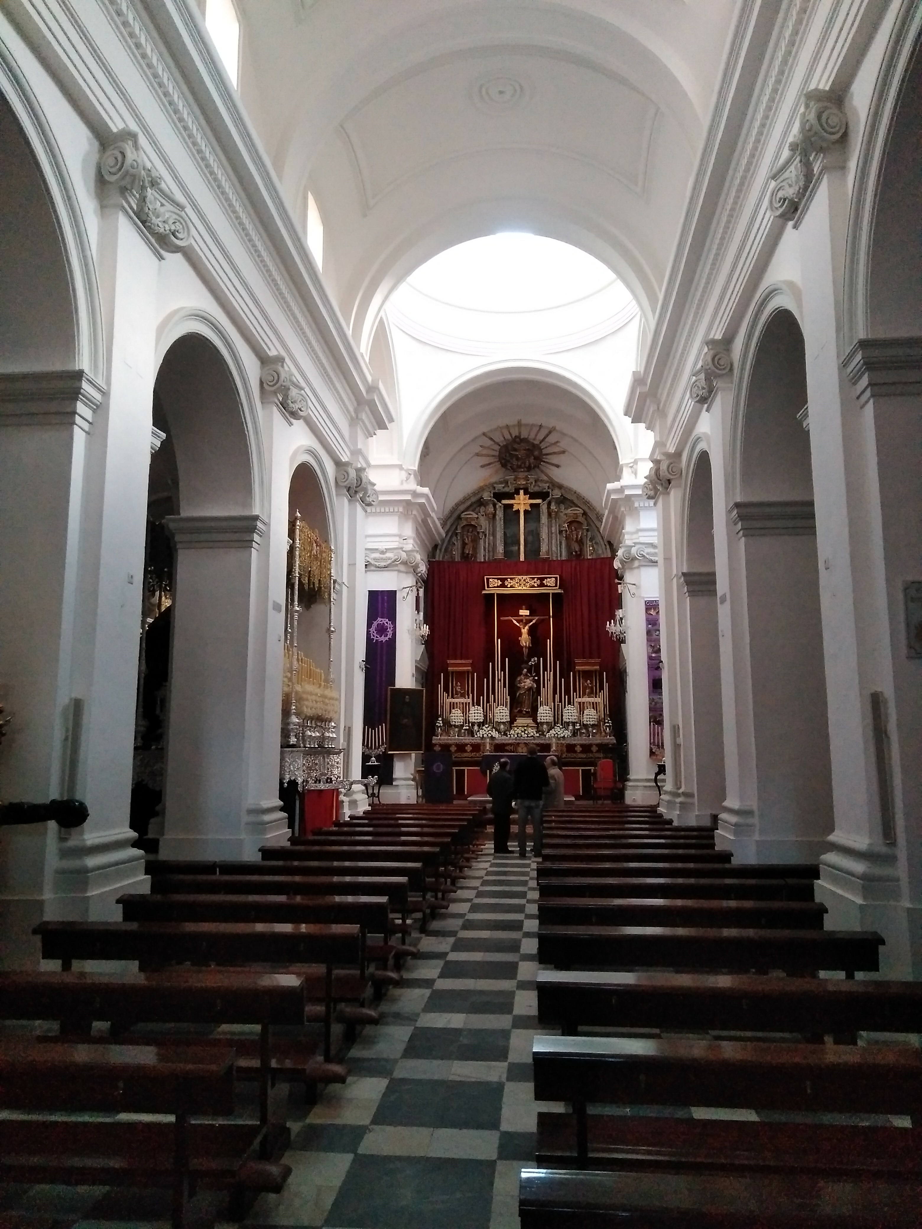 Interior de la parroquia de San José en Cádiz (España)